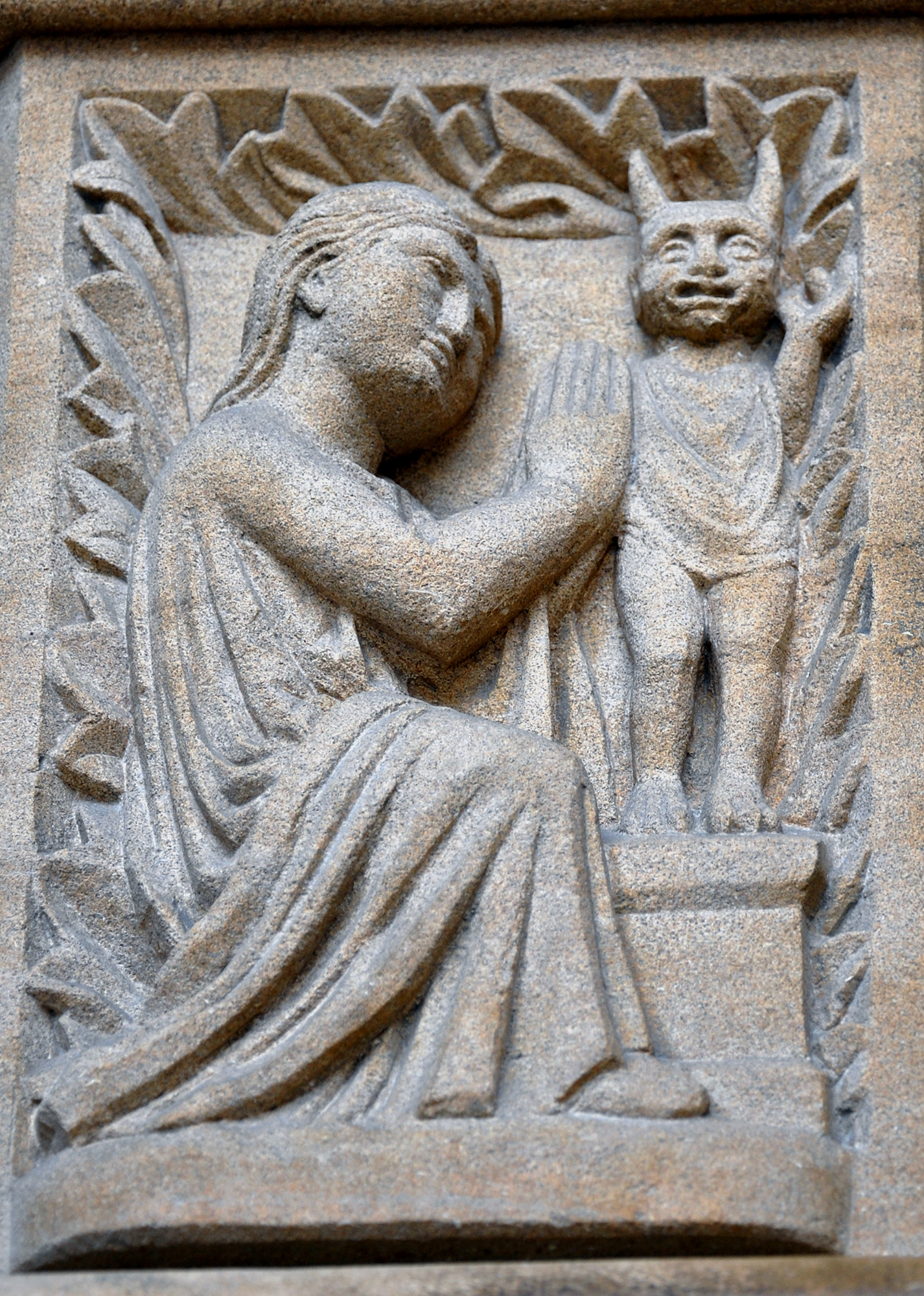 Cathédrale Saint-Etienne de Metz, le Portail de la Vierge. Détail: l'adoration des idoles.